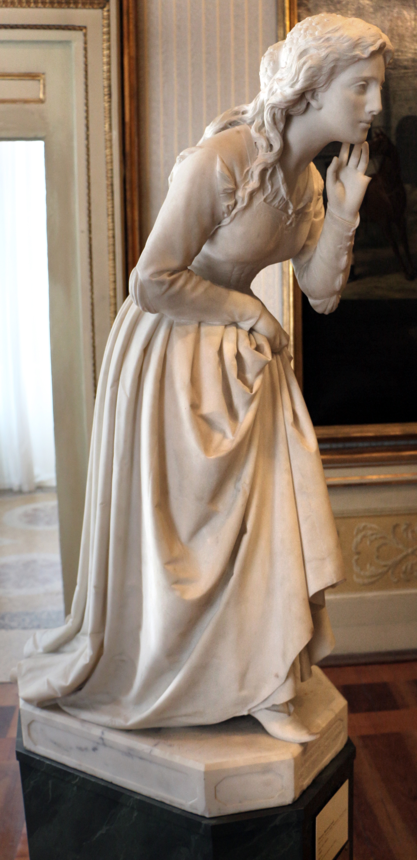 Villa Reale di Milano This is a photo of a monument which is part of cultural heritage of Italy.